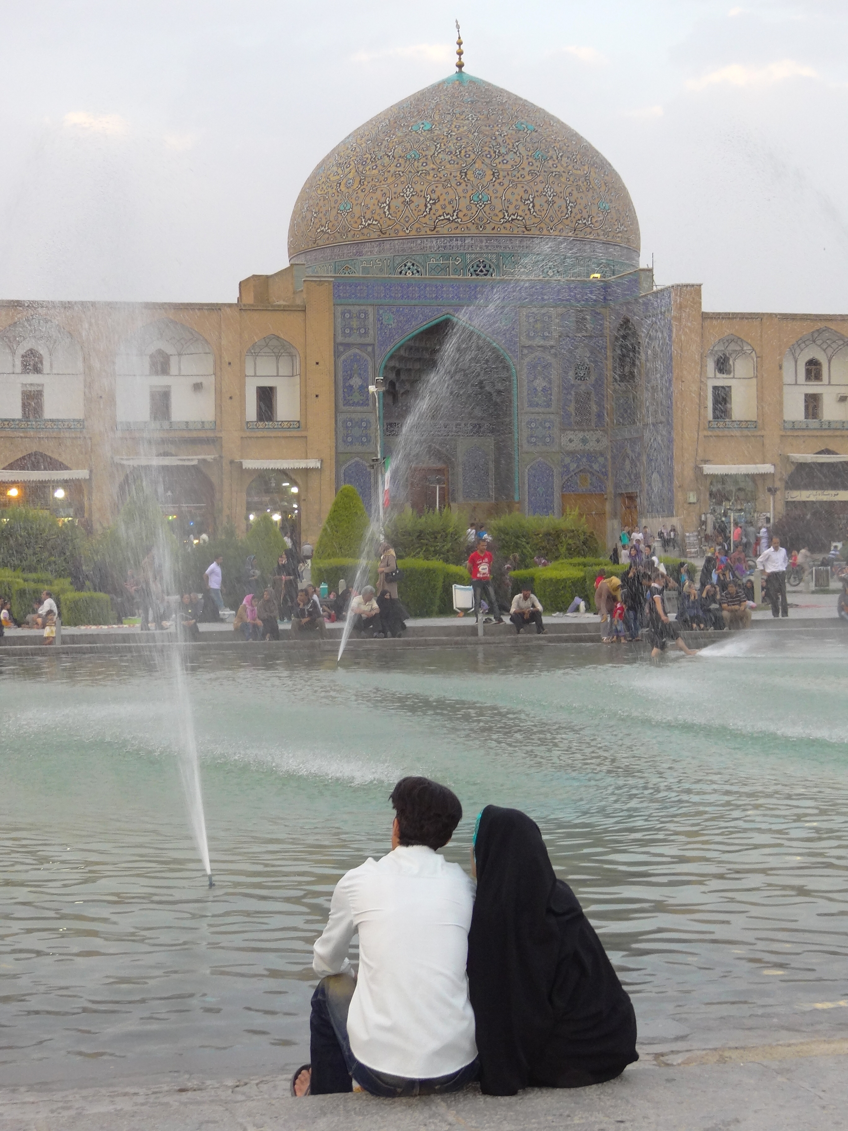 Evening in Imam Square (Naqsh-e Jahan) - Isfahan - Central Iran